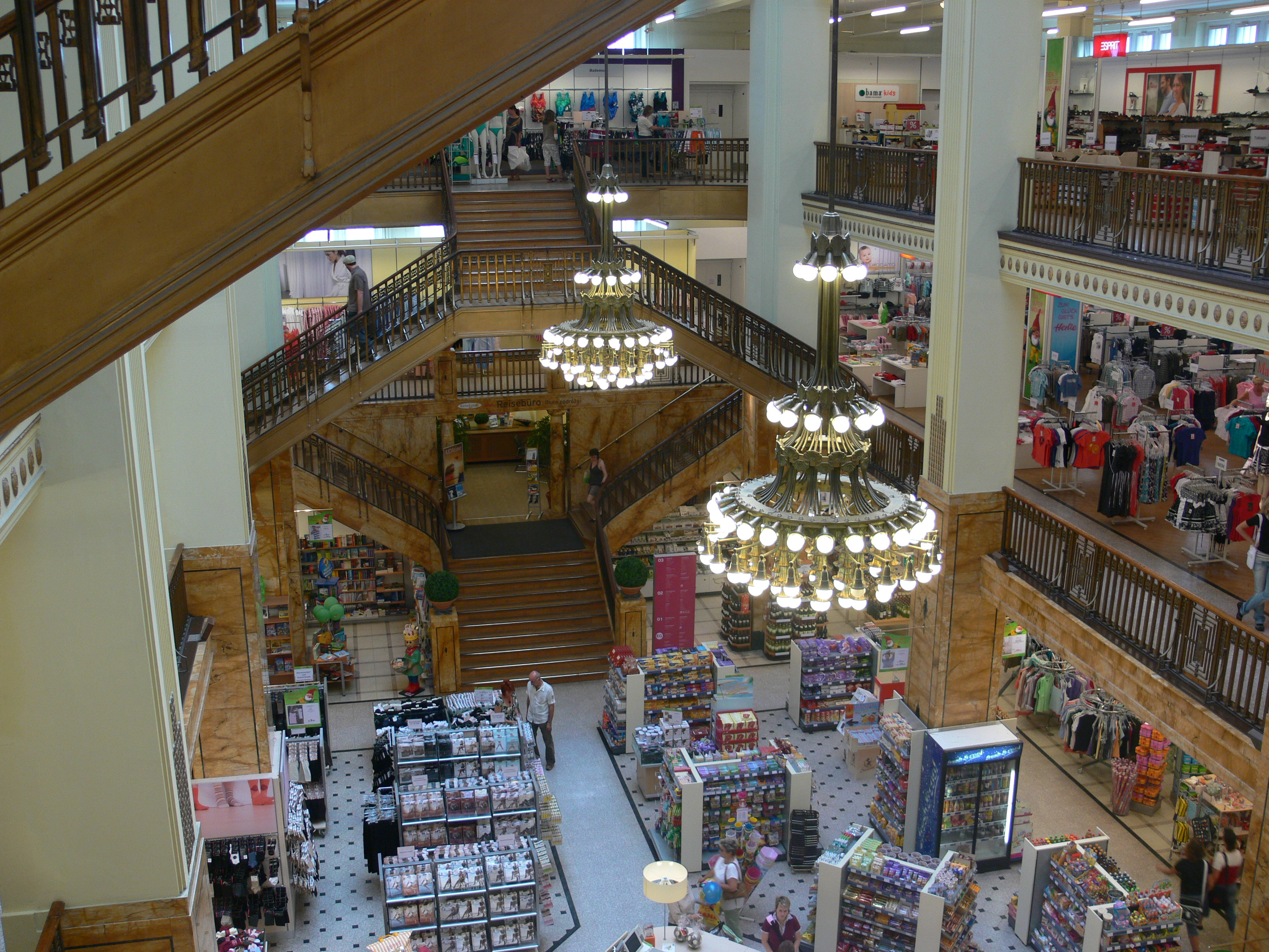 Jugendstilkaufhaus Görlitz